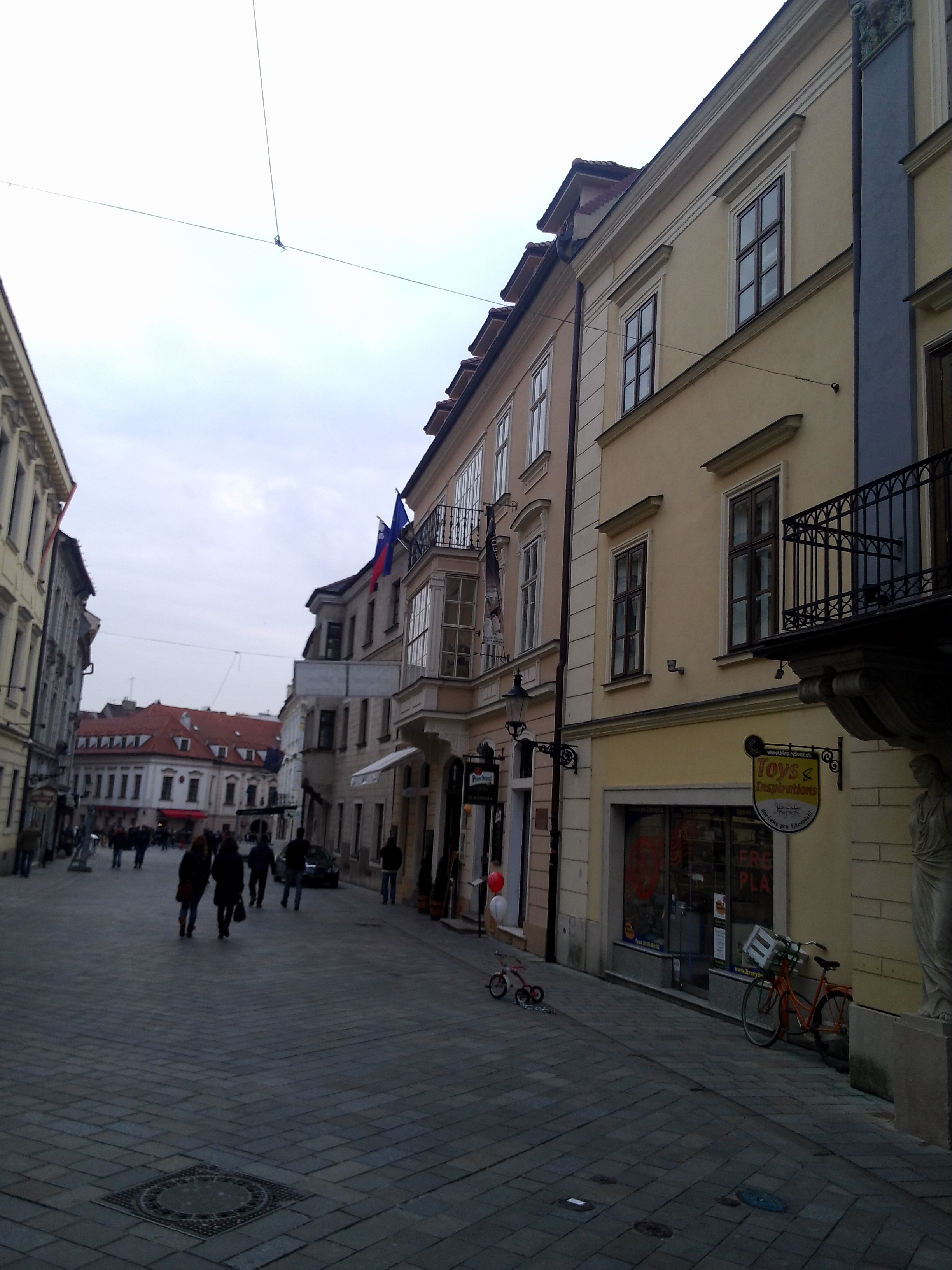 Посольство Словенії в Словаччині